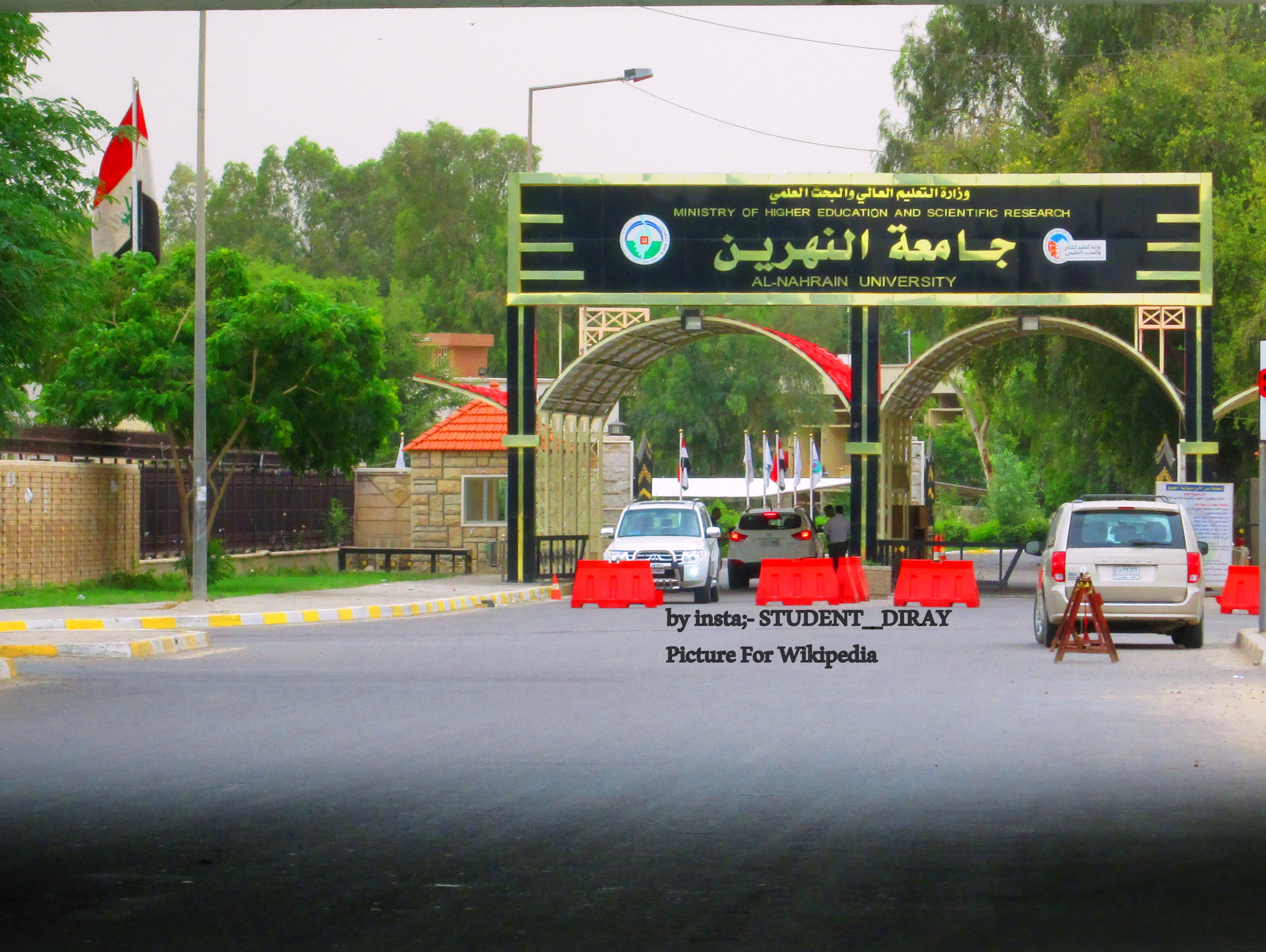 بوابة جامعة النهرين